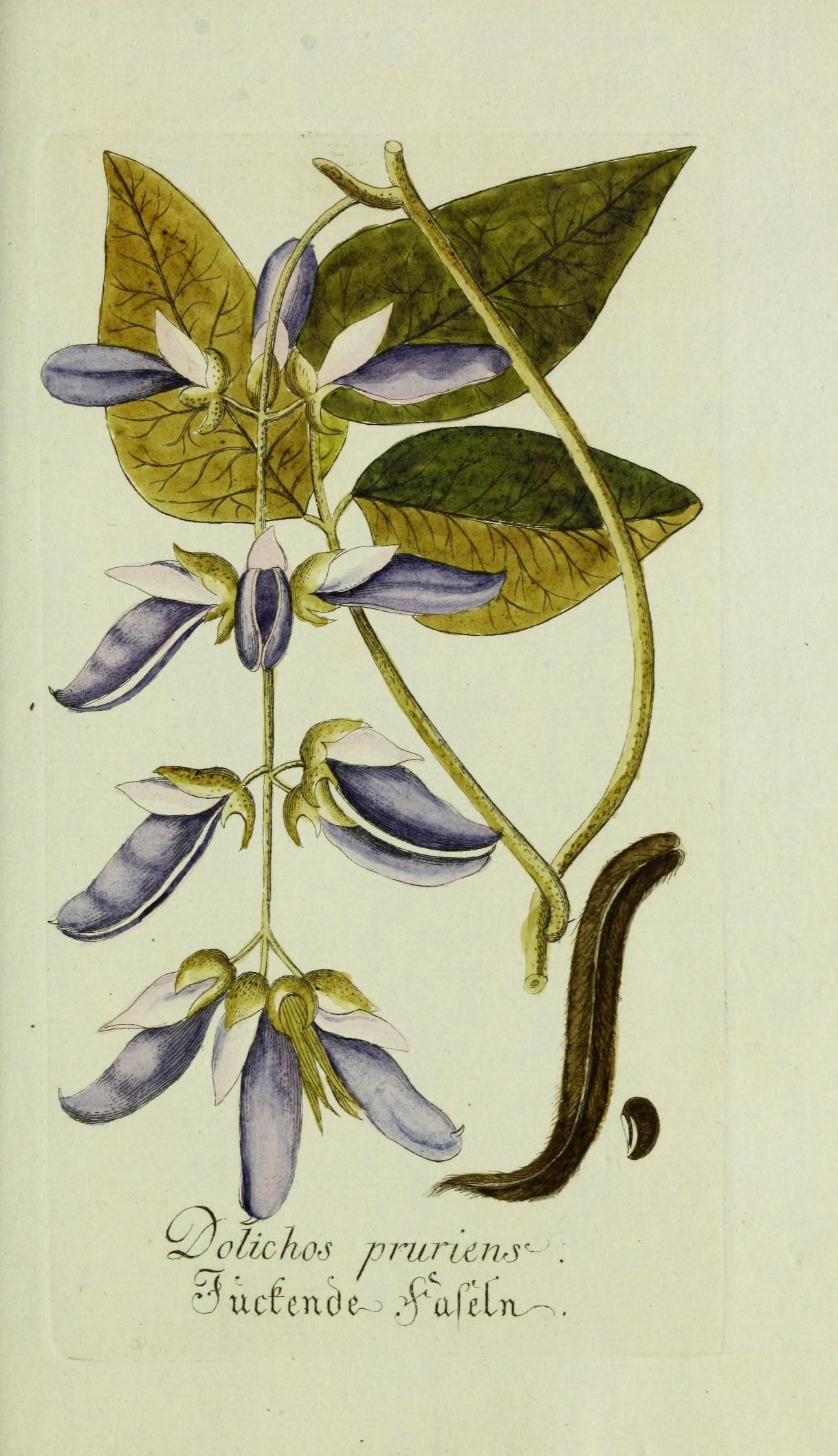 Plantarum indigenarum et exoticarum icones ad vivum coloratae, oder, Sammlung nach der Natur gemalter Abbildungen inn- und ausländlischer Pflanzen, für Liebhaber und Beflissene der Botanik /